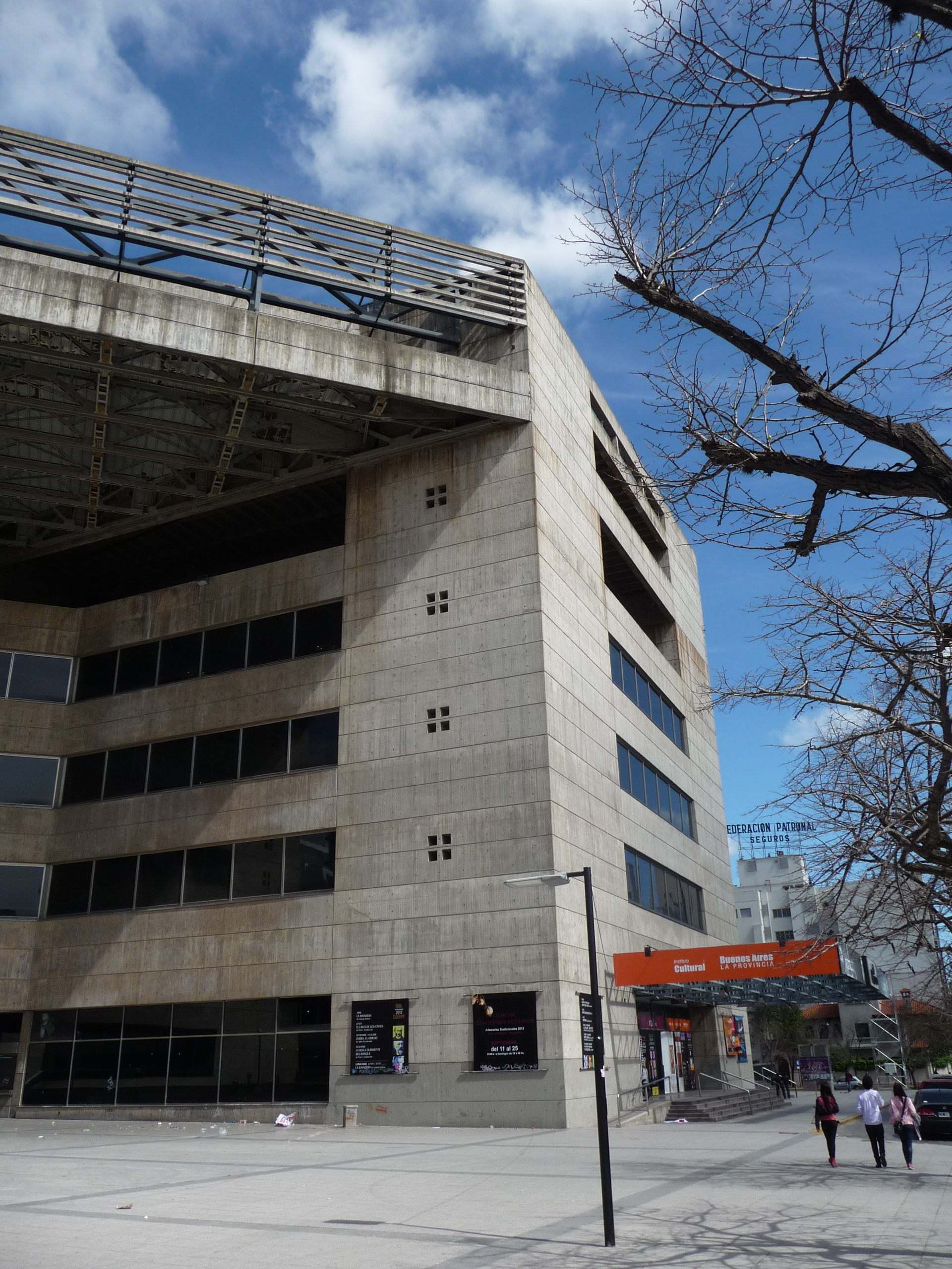 Complejo cultural Teatro Argentino de La Plata - Fachada y puerta de entrada sobre calle 51